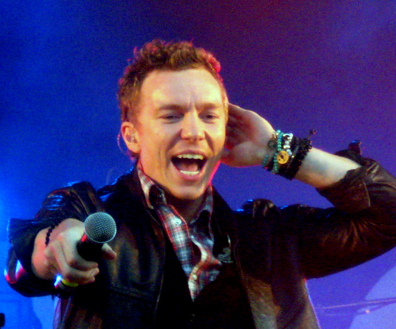 Brinck i Hjørring, juni 2009